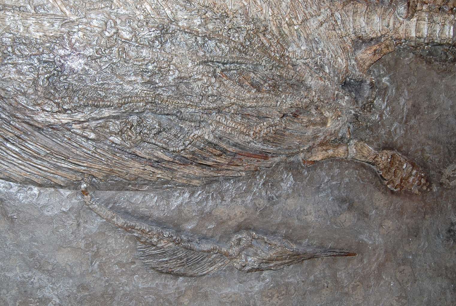 Naturhistorisches Museum Wien